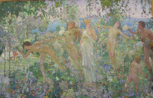 Кузнецов Владимир.